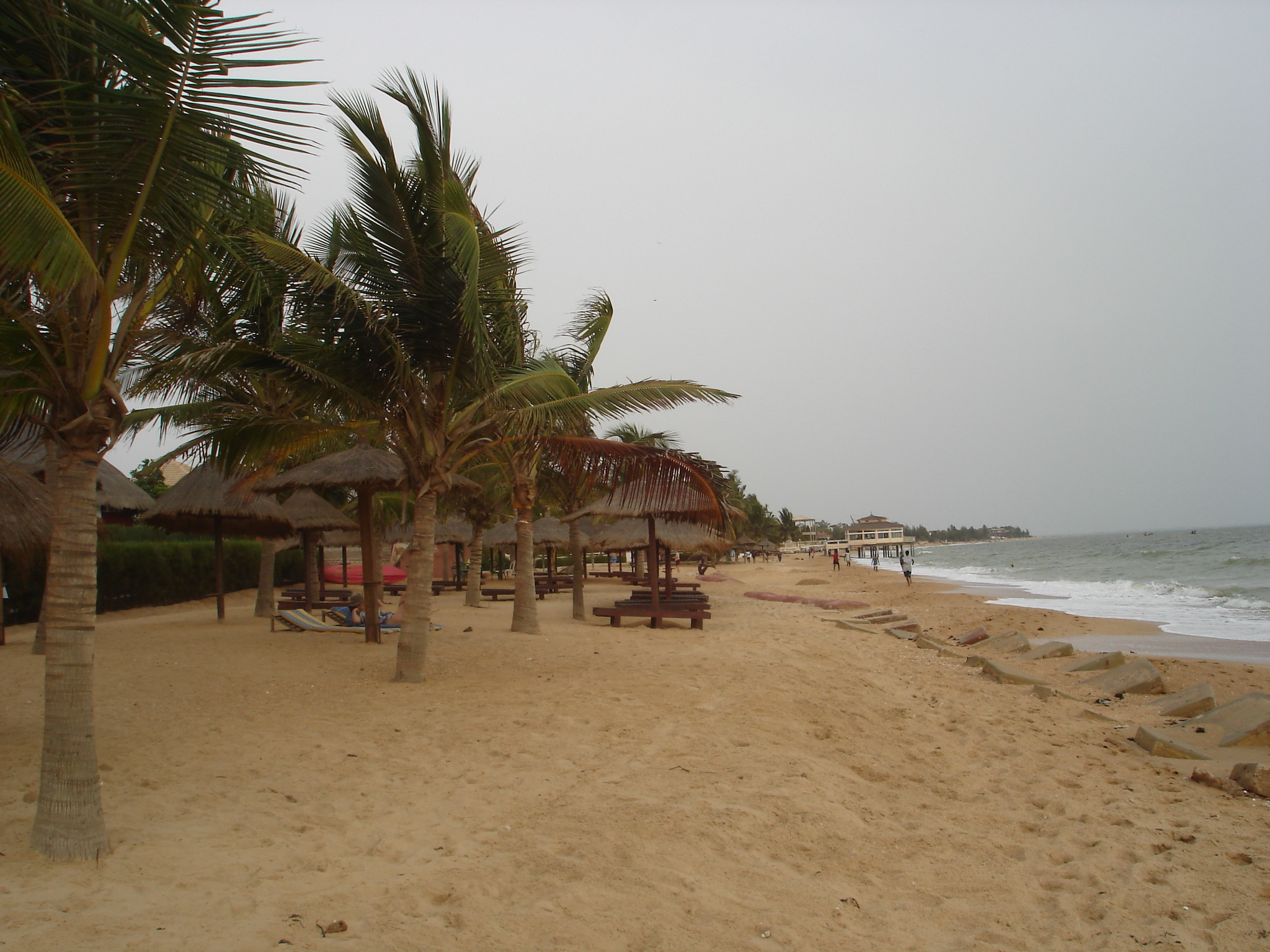 Vue sur la plage de Saly côté sud. Auteur : Jean-Claude Perez